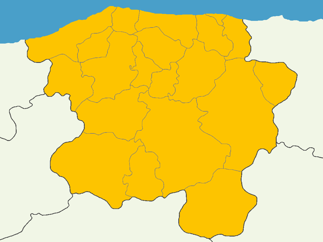 Kastamonu'da 2014 Türkiye cumhurbaşkanlığı seçimi sonuçları